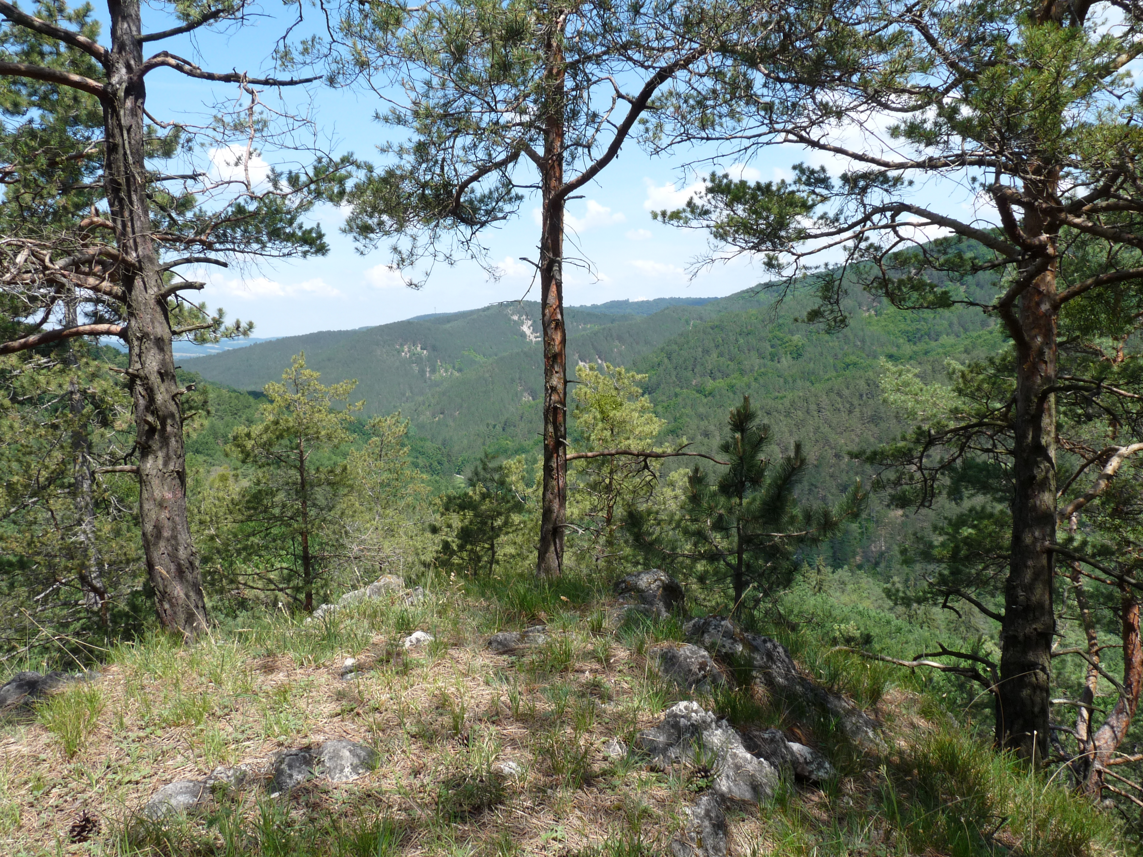 Ševcova skala, výhľad na Bradlo.